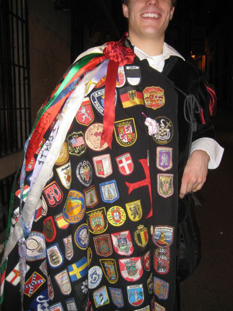 Capa de Tuna. Lo porta Retales de la Tuna de la Universidad San Pablo CEU de Madrid.